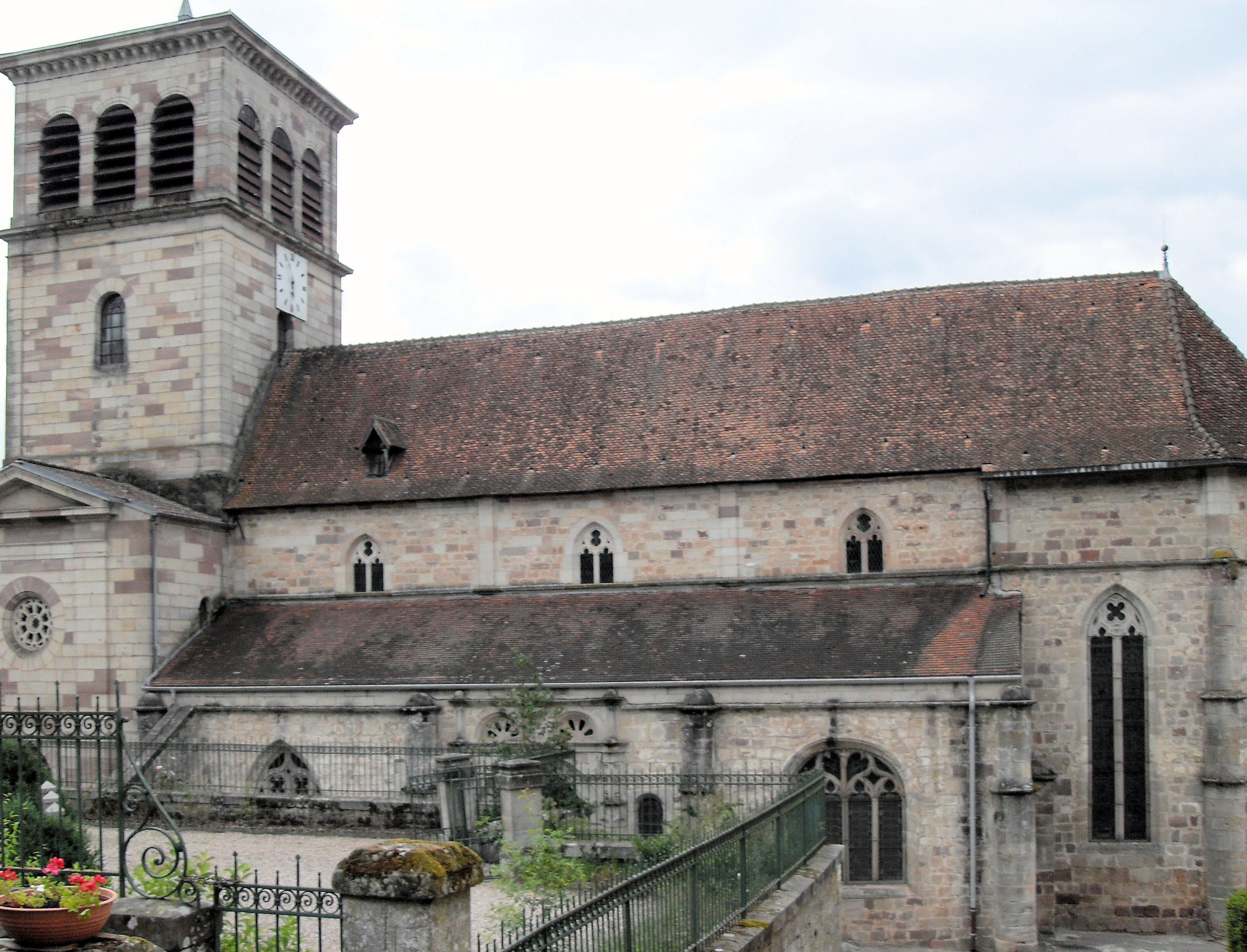 L'église Saint-Mansuy à Fontenoy-le-Château